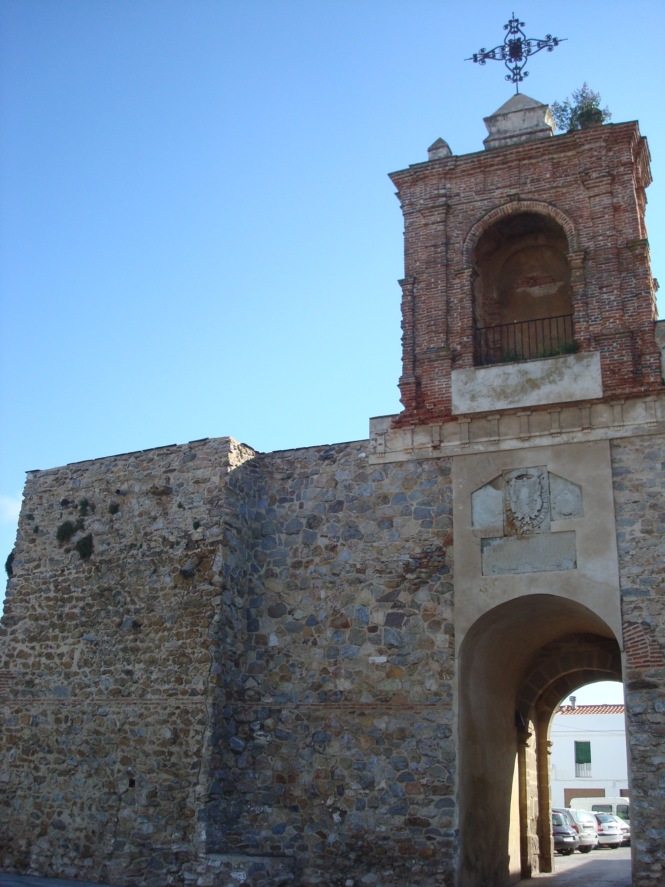 Llerena - 001